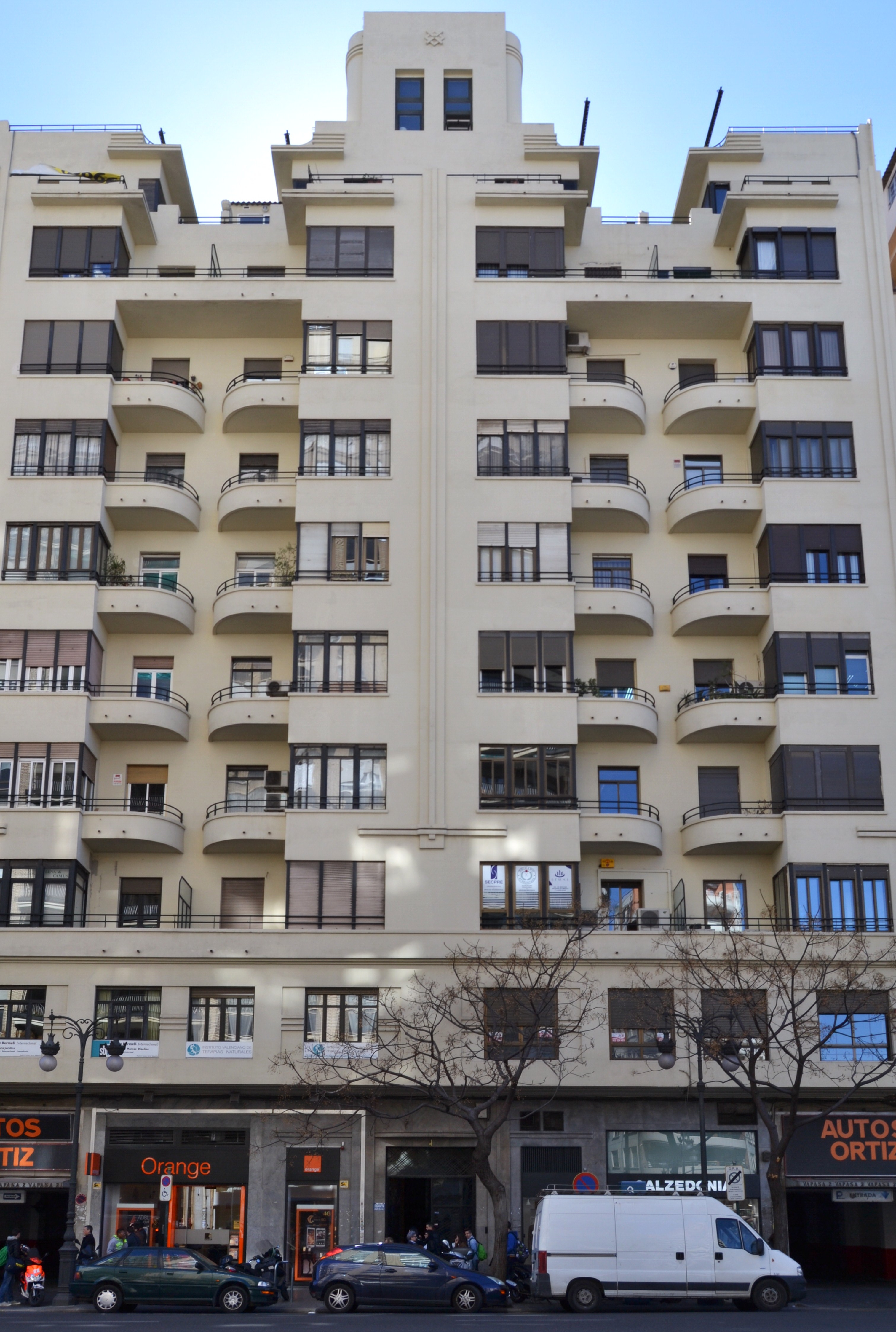 Edifici Roig Vives de Javier Goerlich, València.